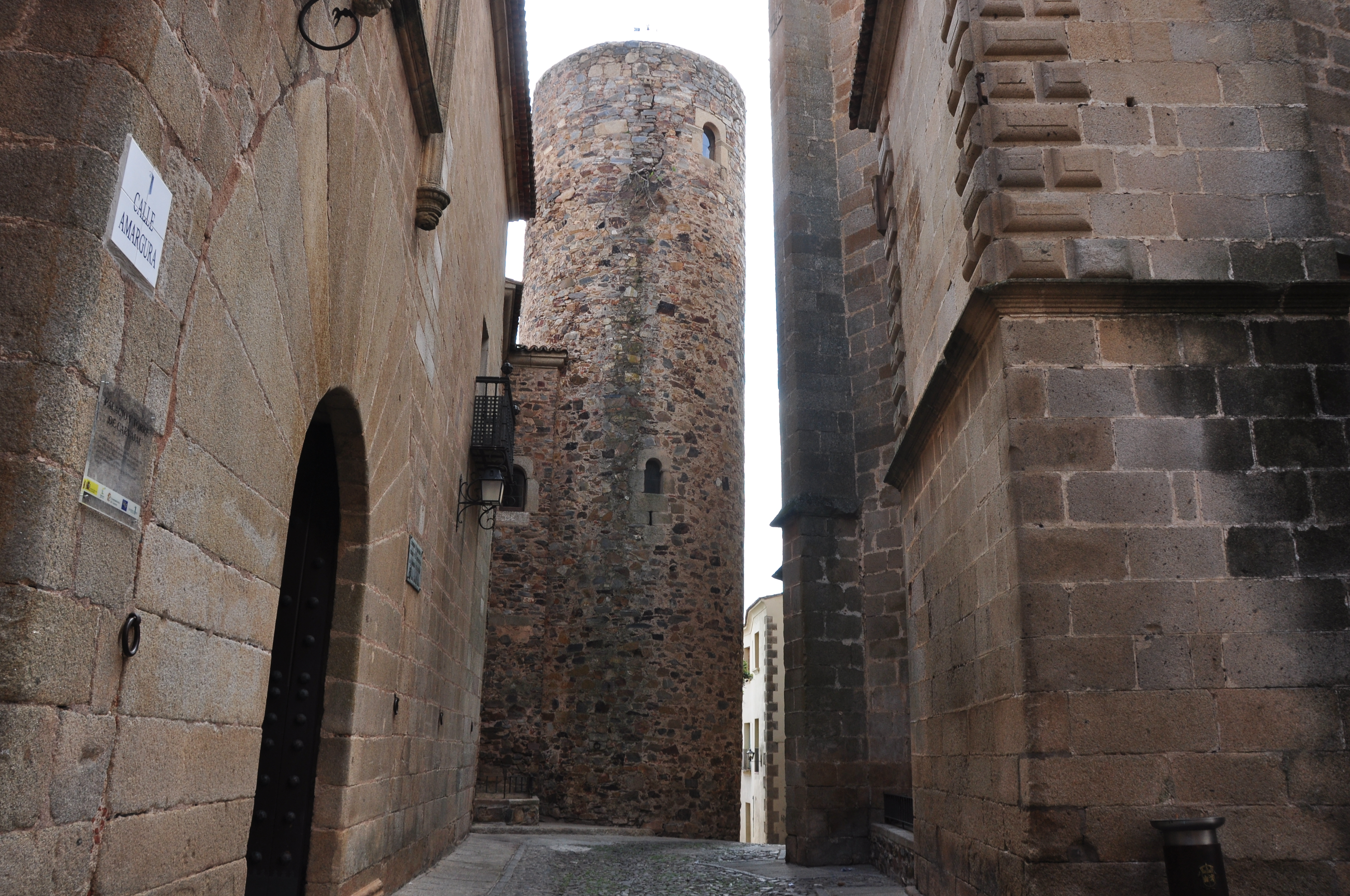 Torre de Carvajal y portado del mismo palacio en la Ciudad Monumental de Cáceres.